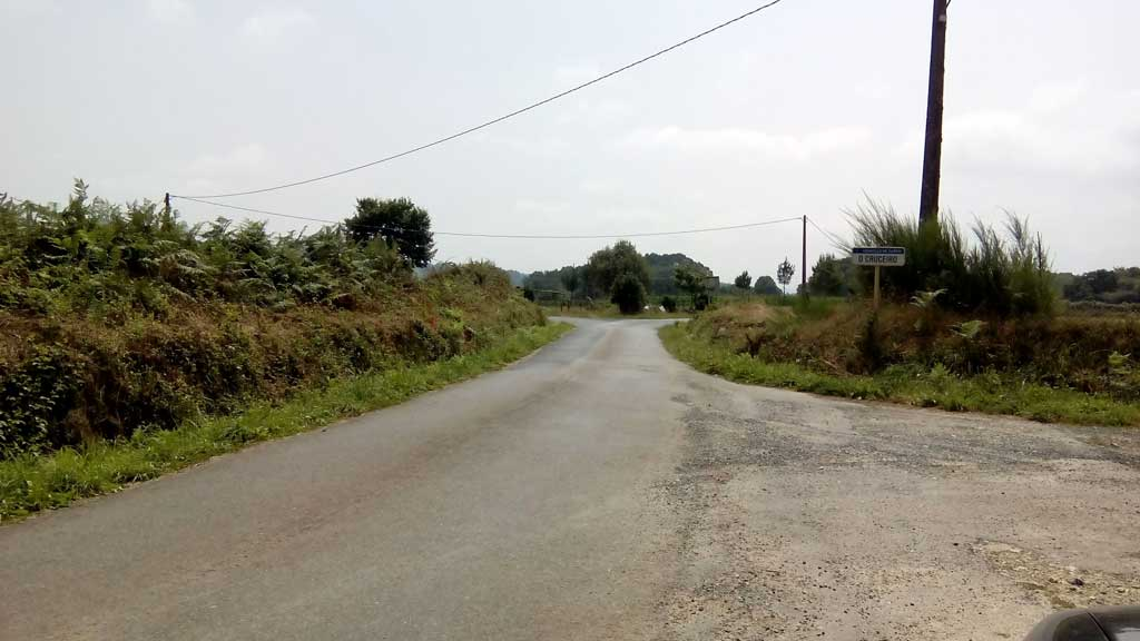 Vista do Cruceiro, Curtis.